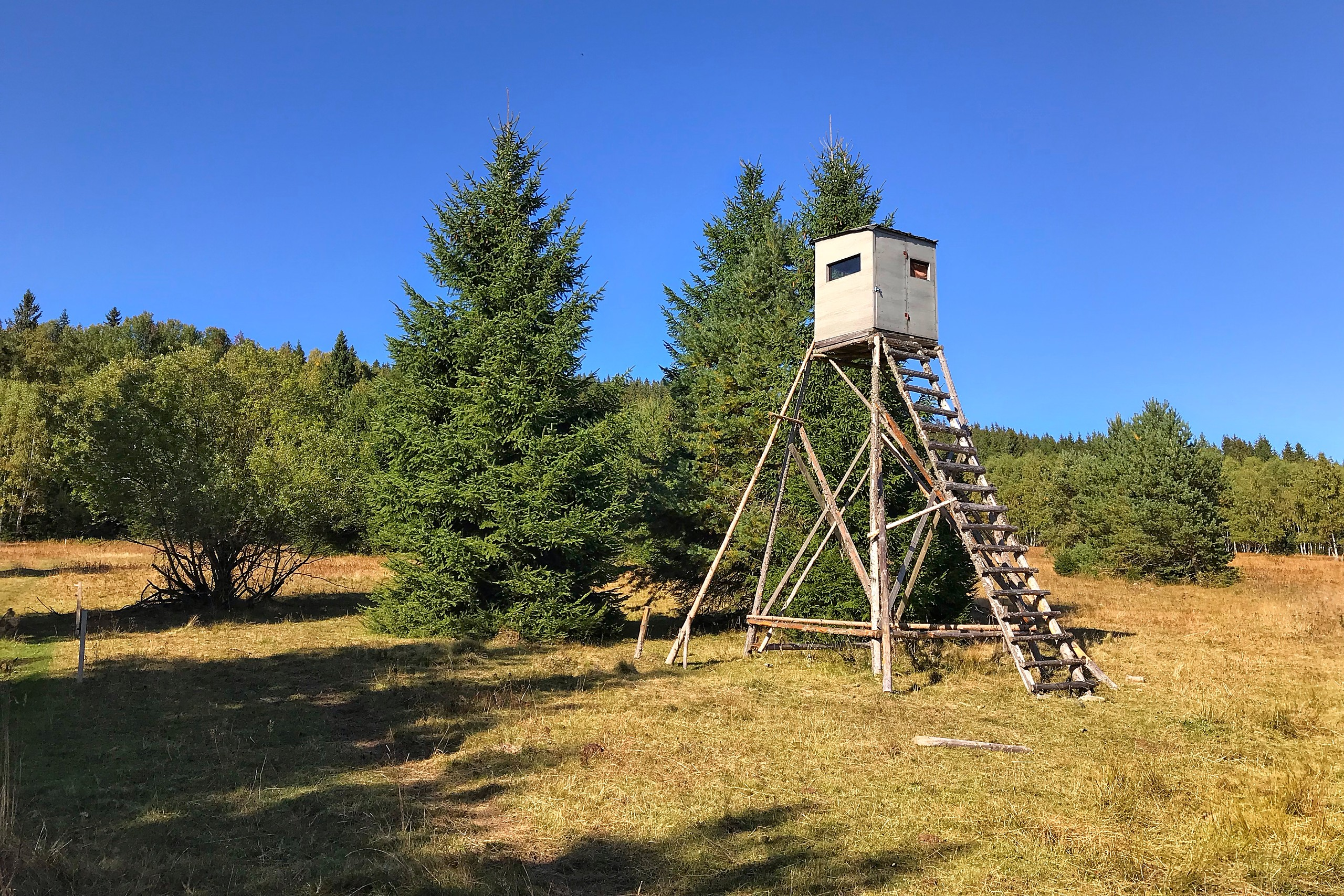 Vysoký hřbet (1078 m) na Šumavě